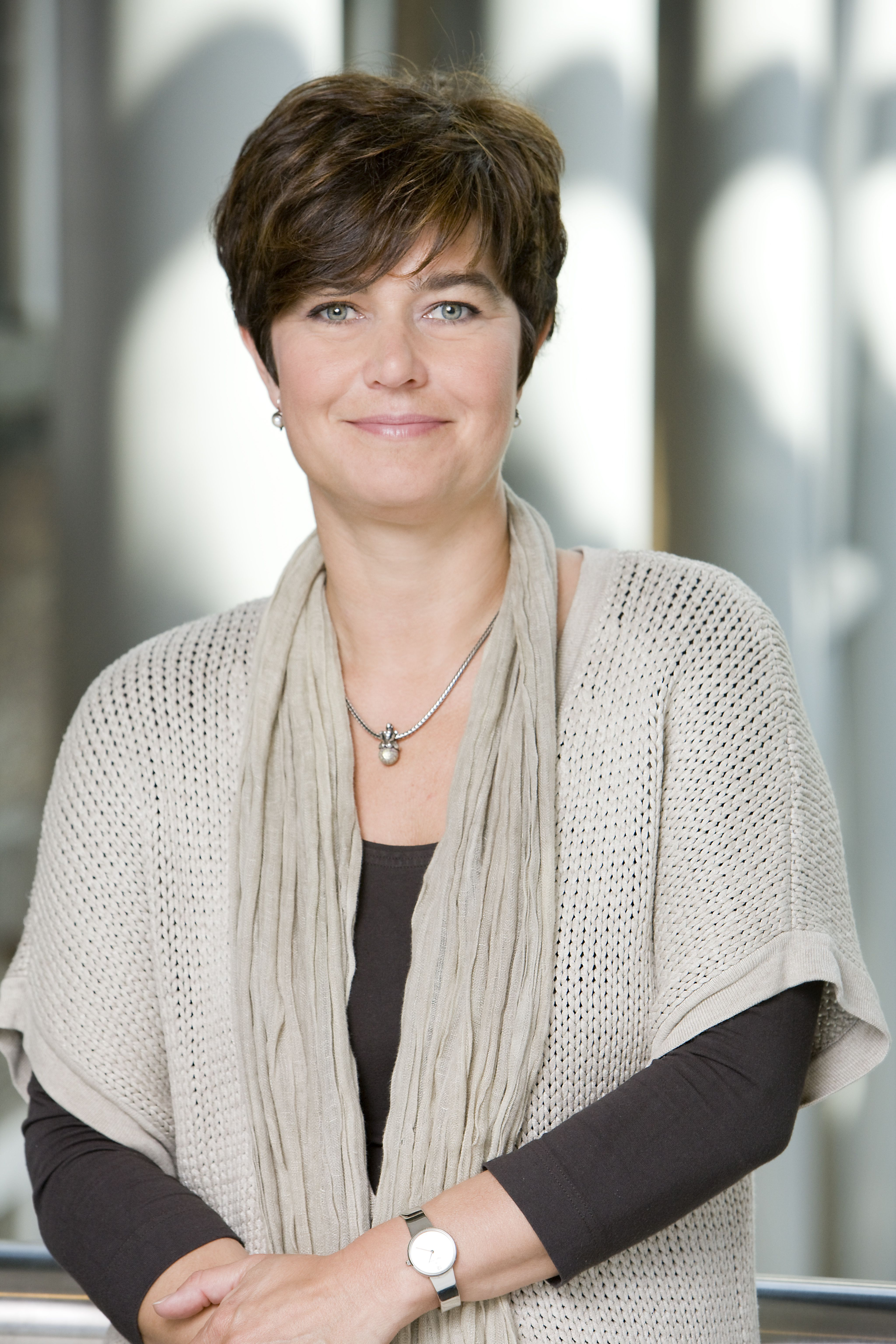 Anouchka van Miltenburg (Utrecht, 20 april 1967) is een Nederlandse journaliste en politica